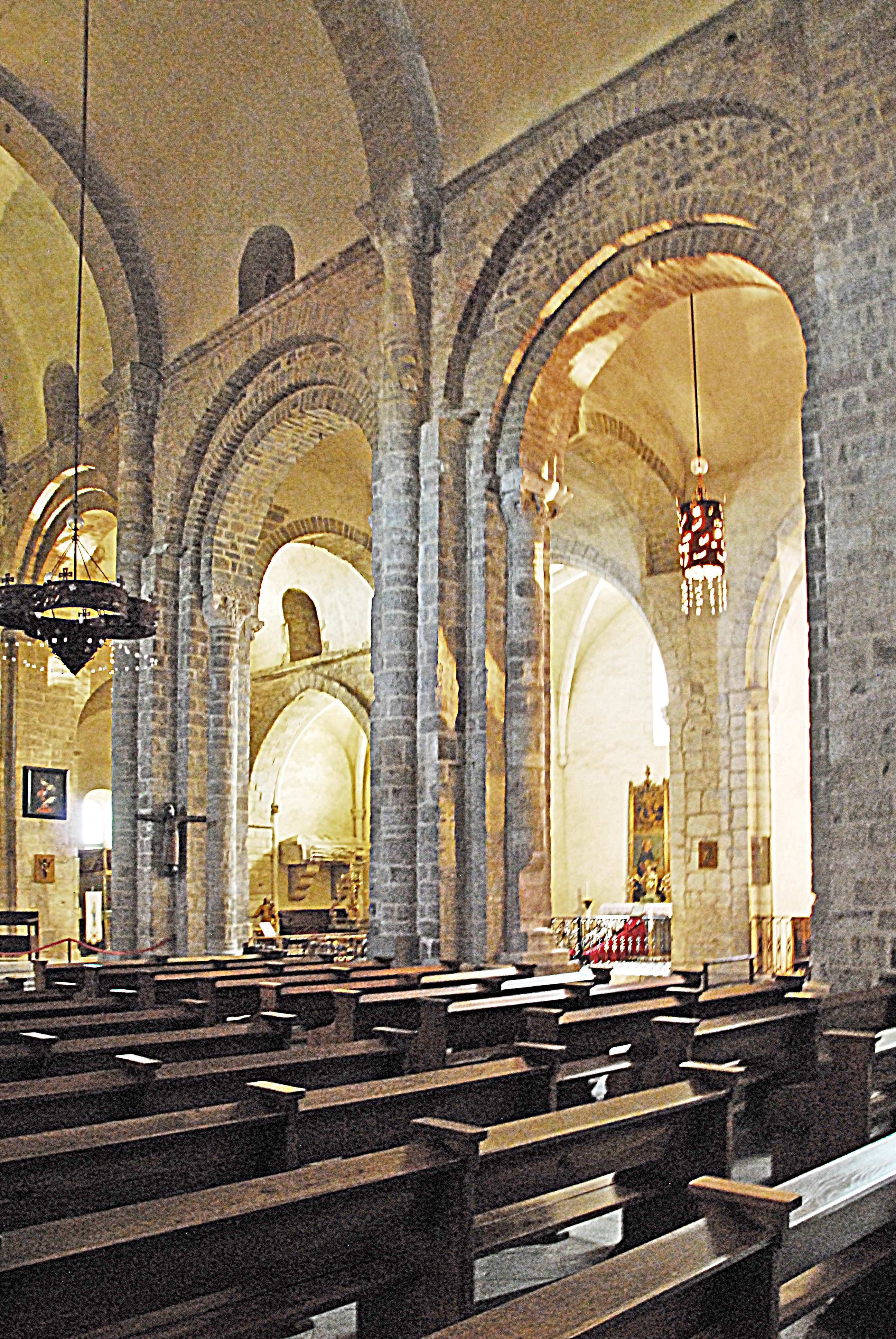 Ste-Eulalie-et-Ste-Julie_d’Elne, südl. Seitenschiff u. Südkapellen aus Chot